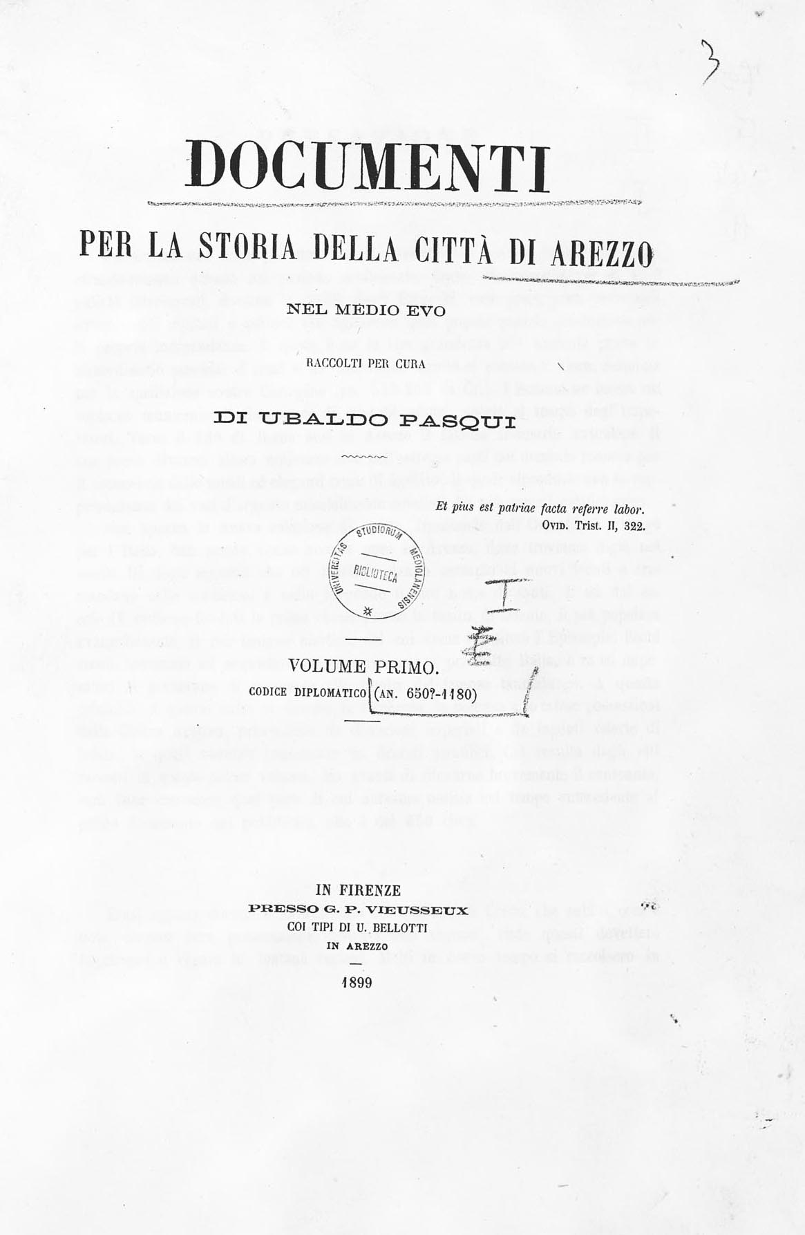 Frontespizio